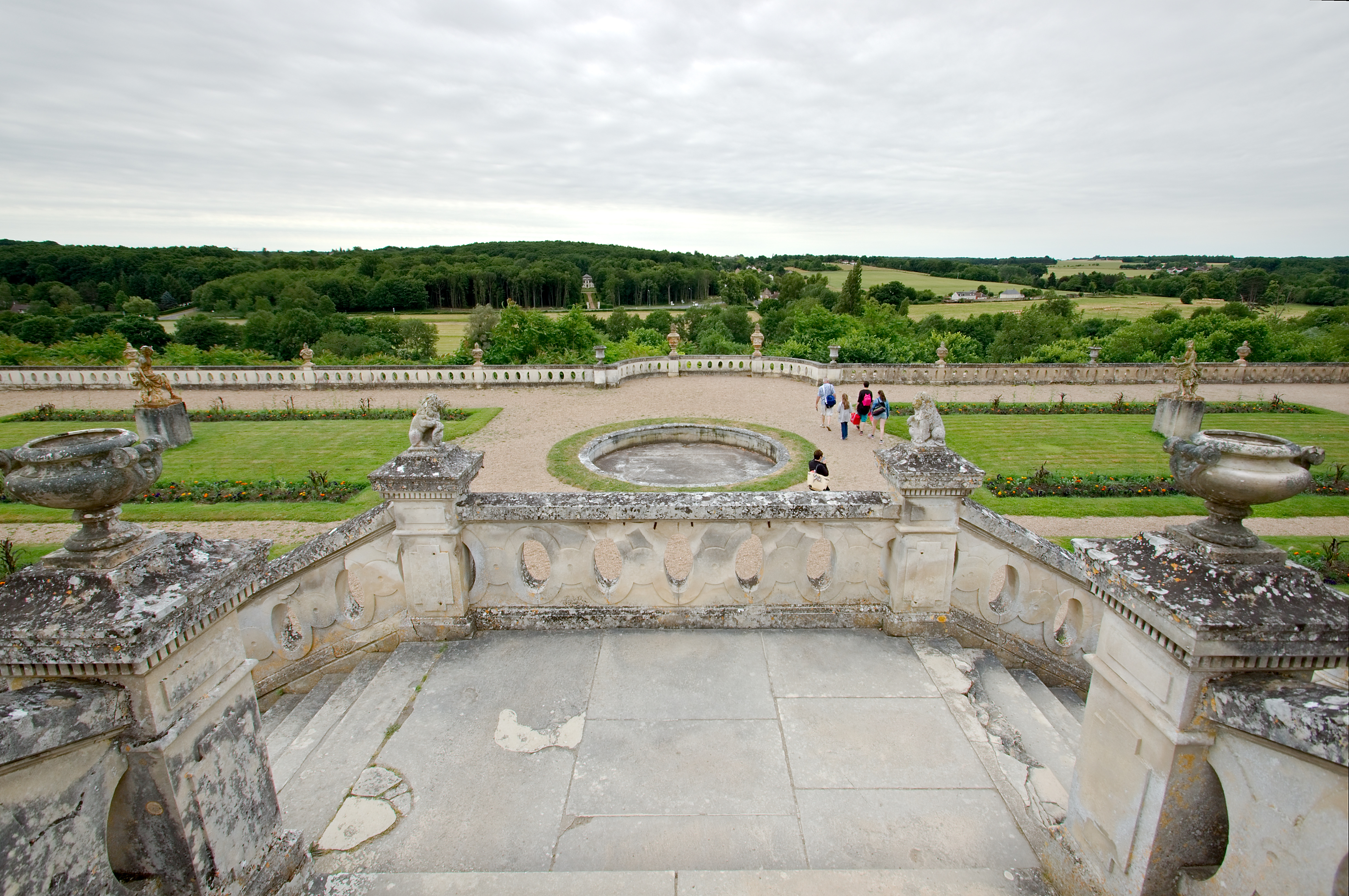 Terrasse du château de Valençay